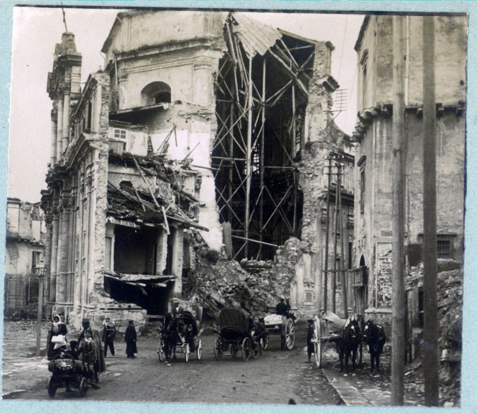 Ruiny po trzęsieniu ziemi w Messynie